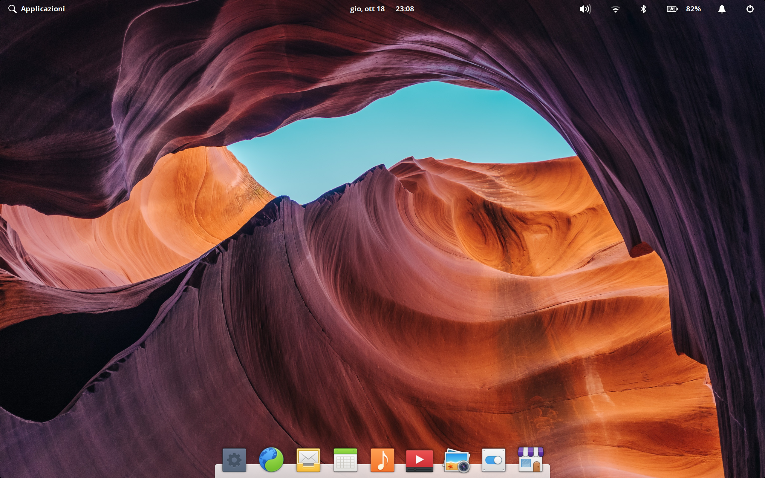 Screenshot della scrivania di elementary OS 5.0 Juno, basato su Ubuntu 18.04 LTS